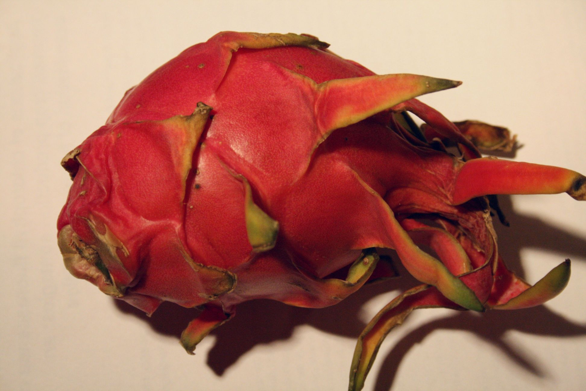 A Hylocereus undatus (Hylocereeae; Cactaceae; Planta) kaktusz termése a vörös pithaya, melyet gyümölcsként termesztenek